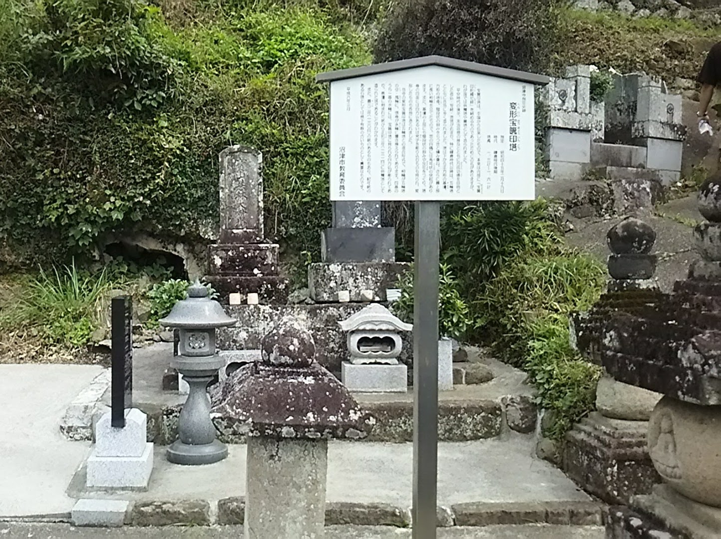 静岡県沼津市の霊山寺内にある市指定文化財、変形宝筐院塔を南から北向きに撮影。